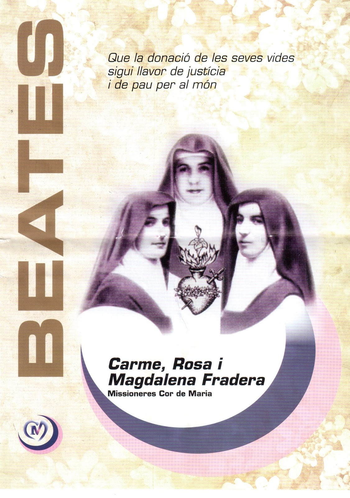 D'una fulla informativa de la Congregació